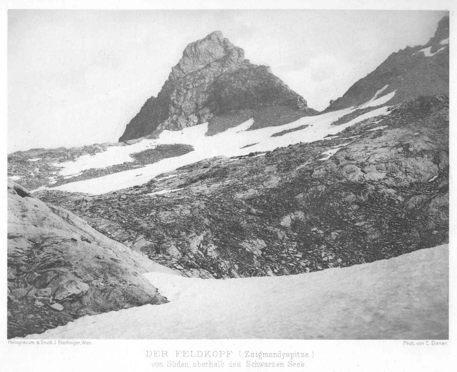 Zsigmondyspitze